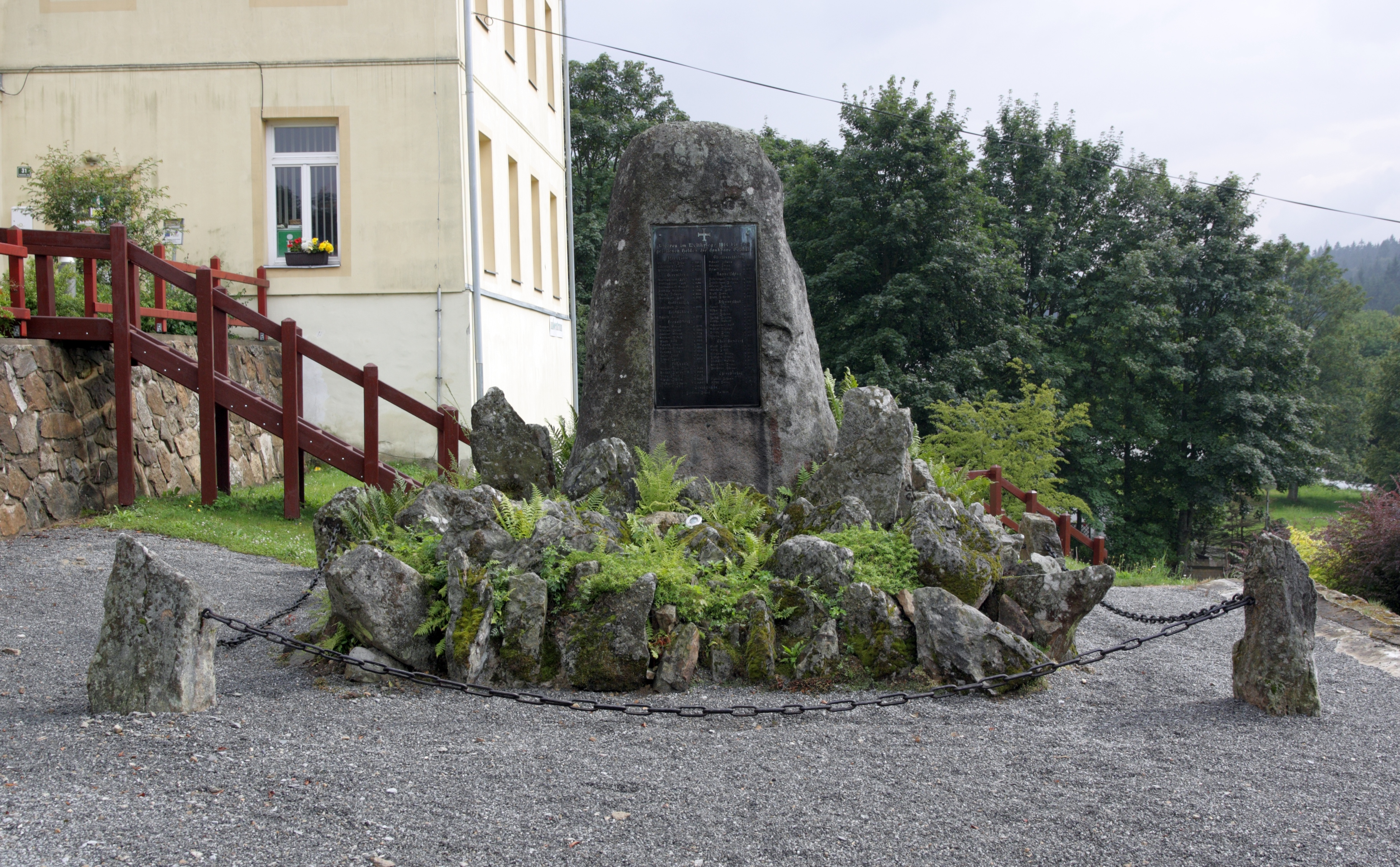 Pohorská Ves - pomník padlým v 1. světové válce.